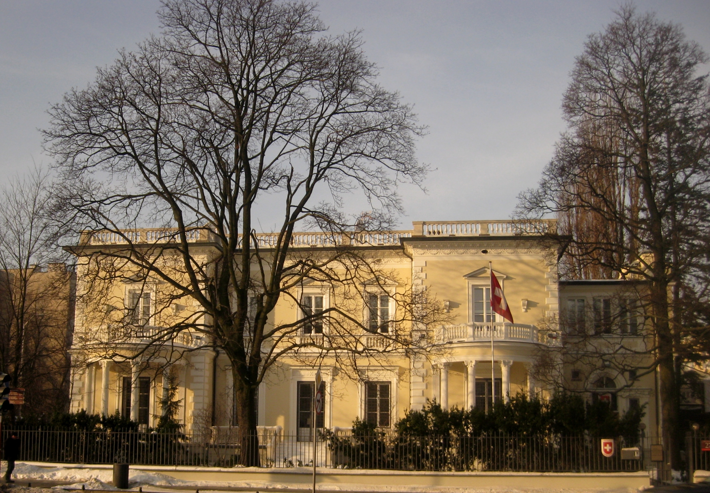 Warszawa, pałacyk Raua